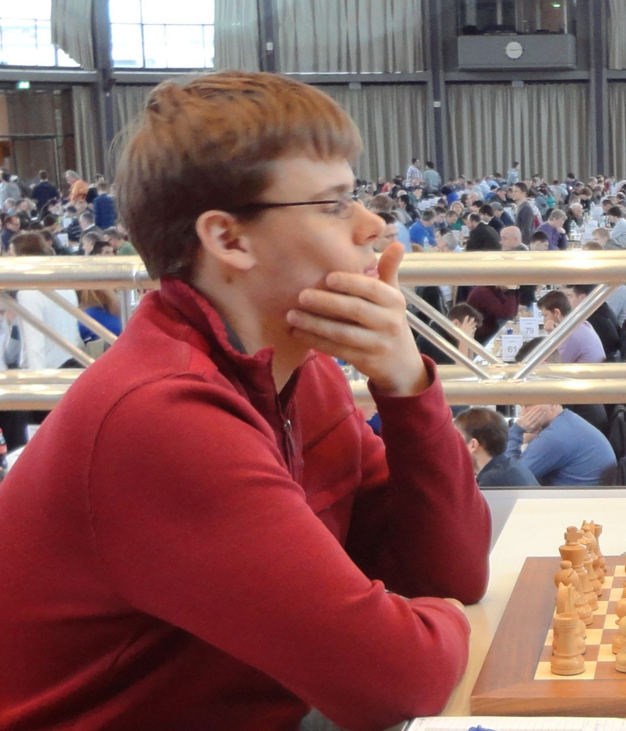 Andreas Heimann - Richard Rapport, Grenke Chess Open 2016 in Karlsruhe.